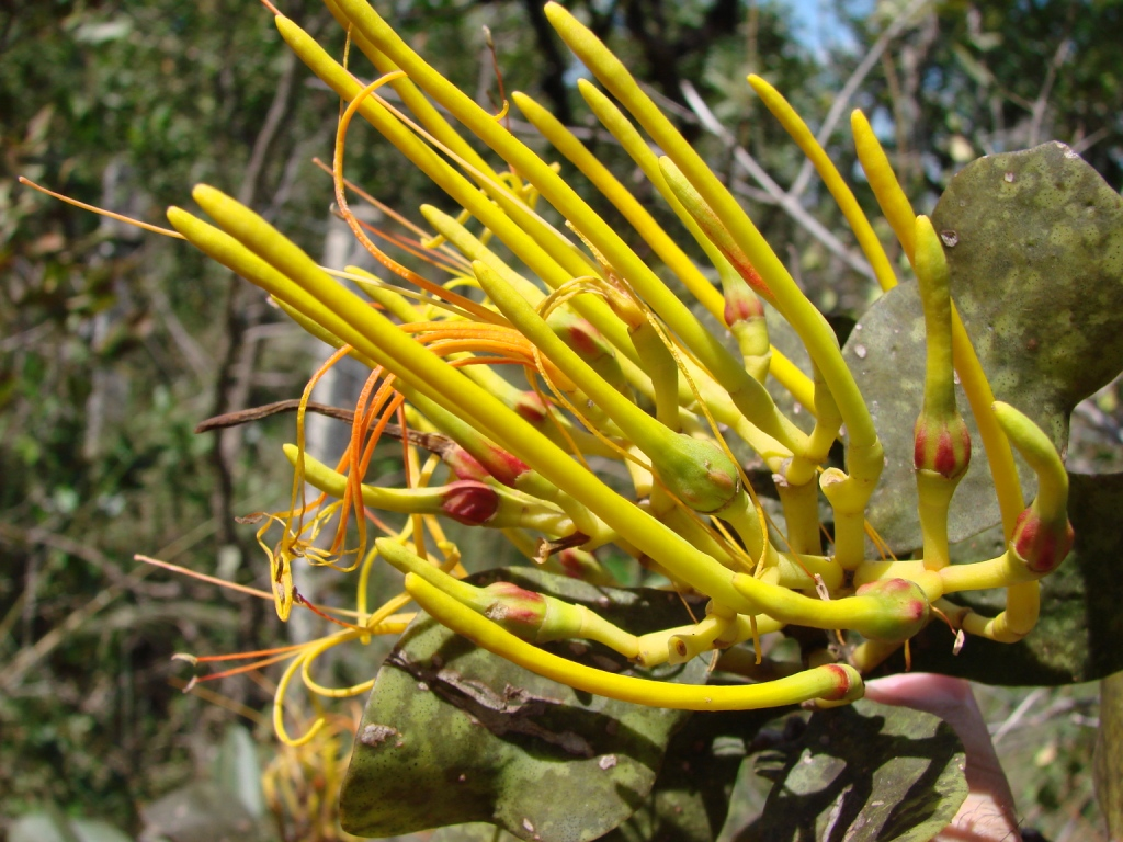 Psittacanthus robustus - LORANTHACEAE Cachoeira do Tororó - Brasília - Distrito Federal - Brasil.